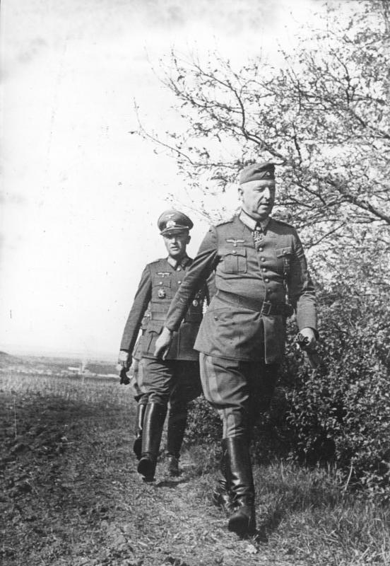 An der Ostfront Eichenlaubträger Generalfeldmarschall von Manstein auf dem Weg zu einem Gefechtsstand am Donez. 10.6.43 [Herausgabedatum] PK Mittelstädt